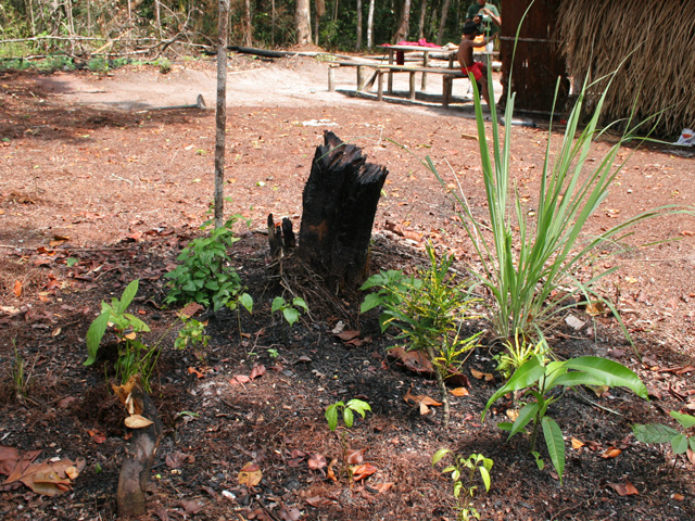 pequena horta indígena com terra preta de índio : pimenta malagueta,pimenta murupi,pimentão vermelho capim santo, cebolinha , chicória e coentro, maxixe e batata doce e uma arvore artesanal típica